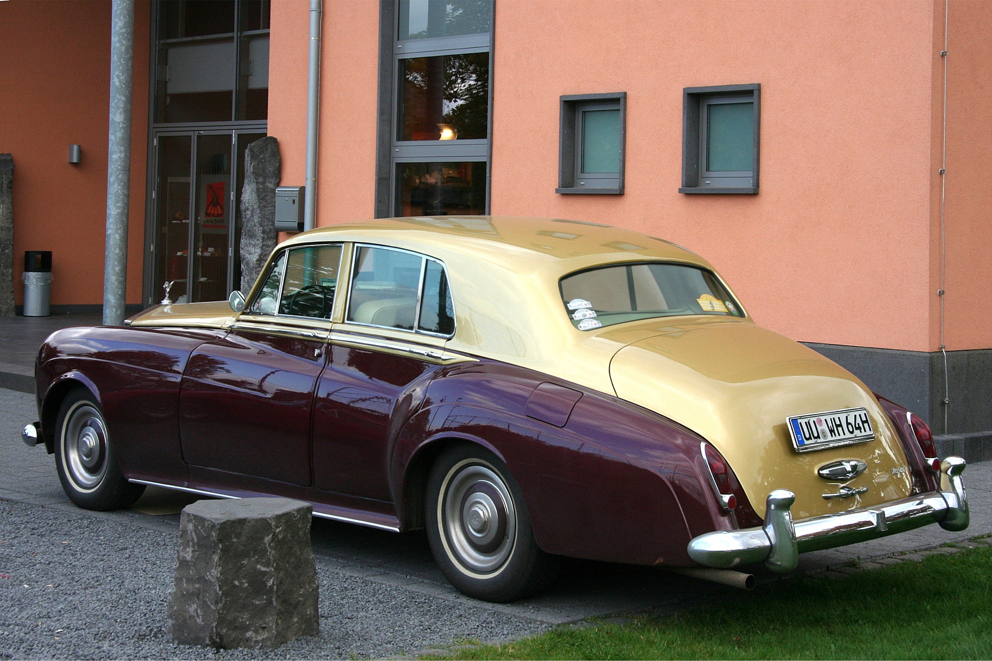 Rolls-Royce Silver Cloud III, Baujahr 1964 (Phantasiekennzeichen)